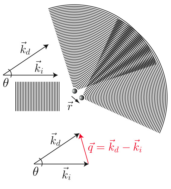 Image créée par Didier Lairez.